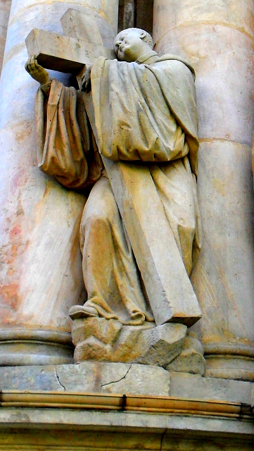 Krzeszów, rzeźba św. Bernarda na fasadzie bazyliki